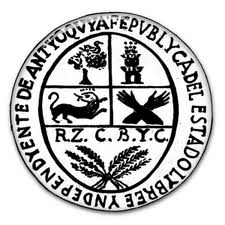 escudo del Estado soberano de Antioquia